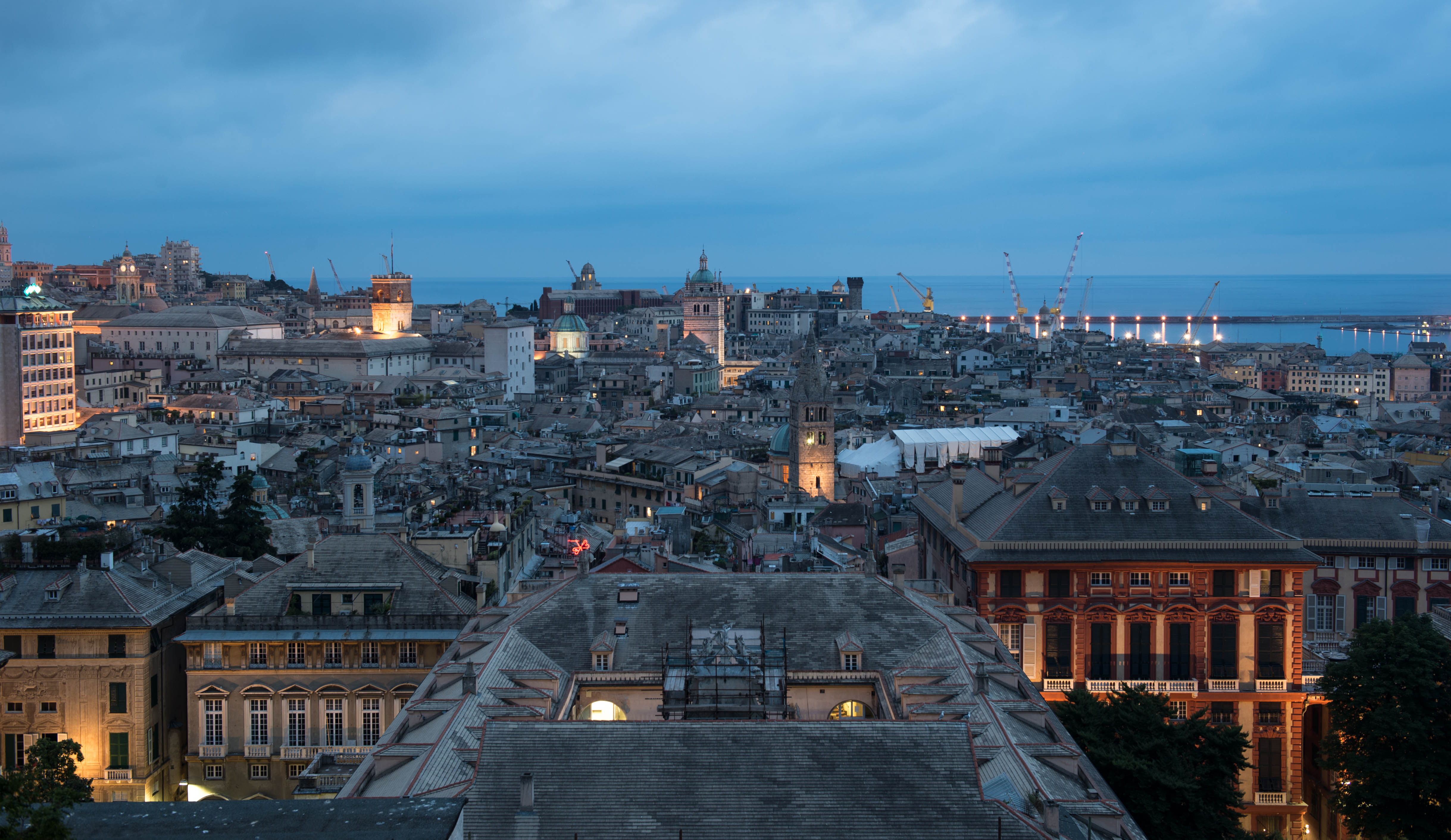 Palazzo Rosso - Musei di Strada Nuova This is a photo of a monument which is part of cultural heritage of Italy.